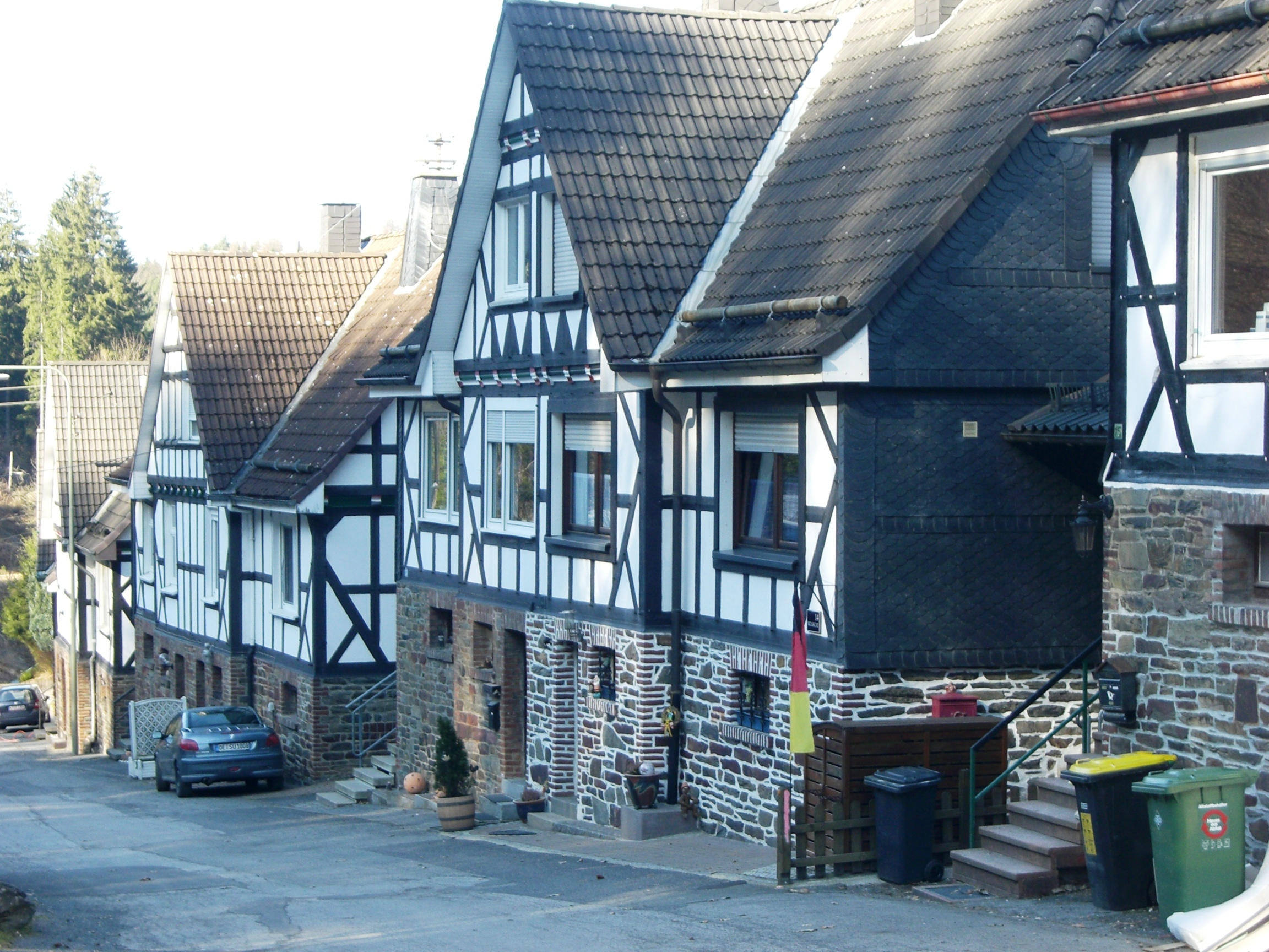 Bergarbeitersiedlungen aus dem Jahr 1919, insgesamt 7 Doppelhaushälften